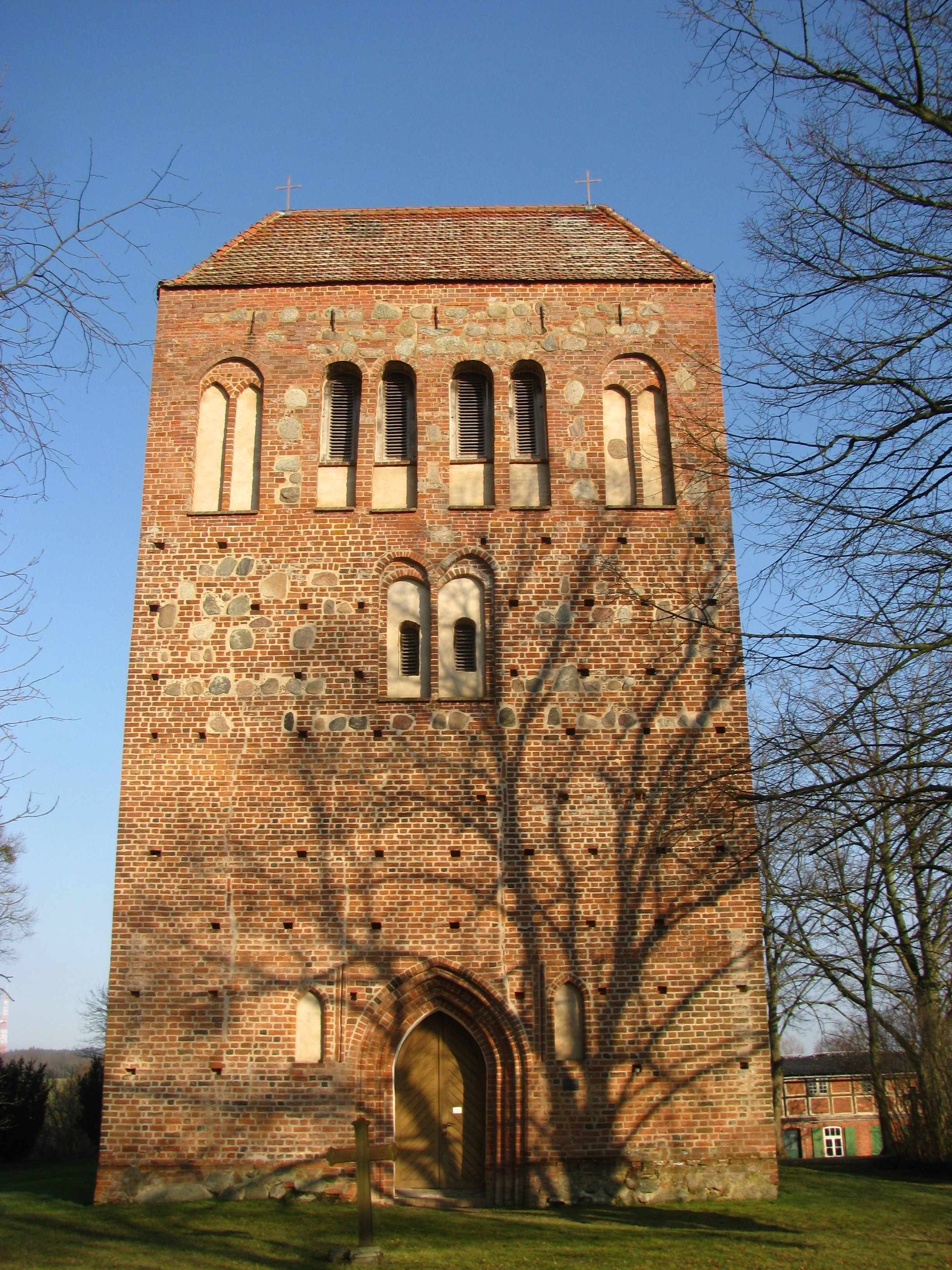 Dorfkirche Hohen Mistorf Westansicht Winter